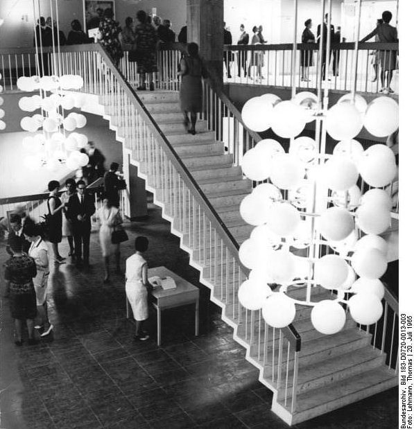 Neubrandenburg, Haus der Kultur und Bildung, Foyer Zentralbild Lehmann Bre-At. 20.7.1965 Das neue Haus der Kultur und Bildung in Neubrandenburg. Hier ein Blick in das großzügig gestaltete Foyer.